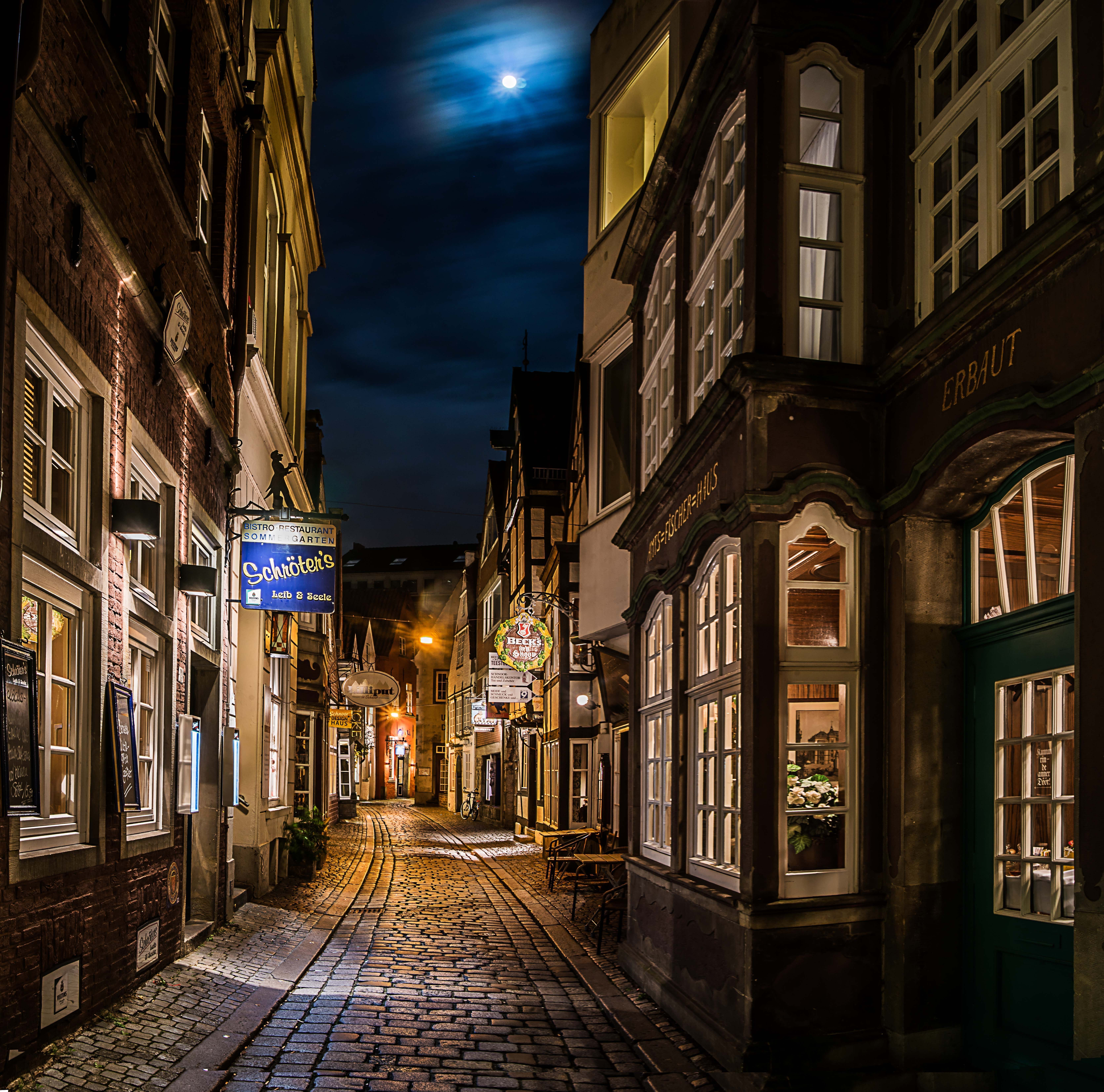 Schnoor bei nachtDas abgebildete Objekt ist ein geschütztes Kulturdenkmal in der Freien Hansestadt Bremen, mit der Nr. 1112 beim Landesamt für Denkmalpflege registriert.